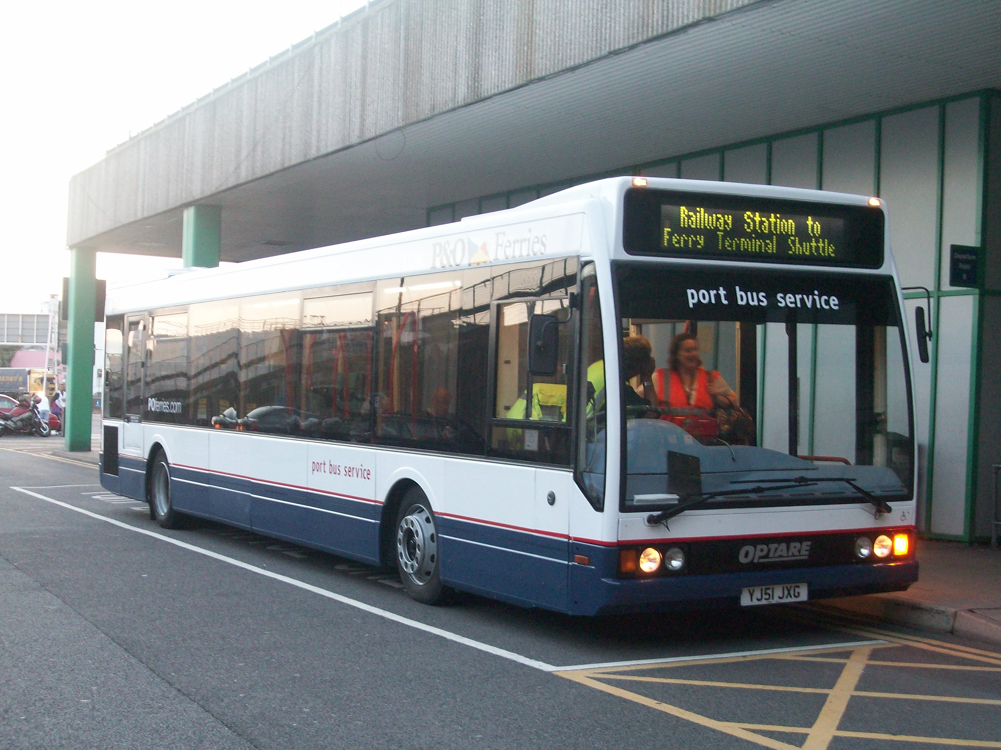 Autobus Optare de la compagnie P&O Ferries